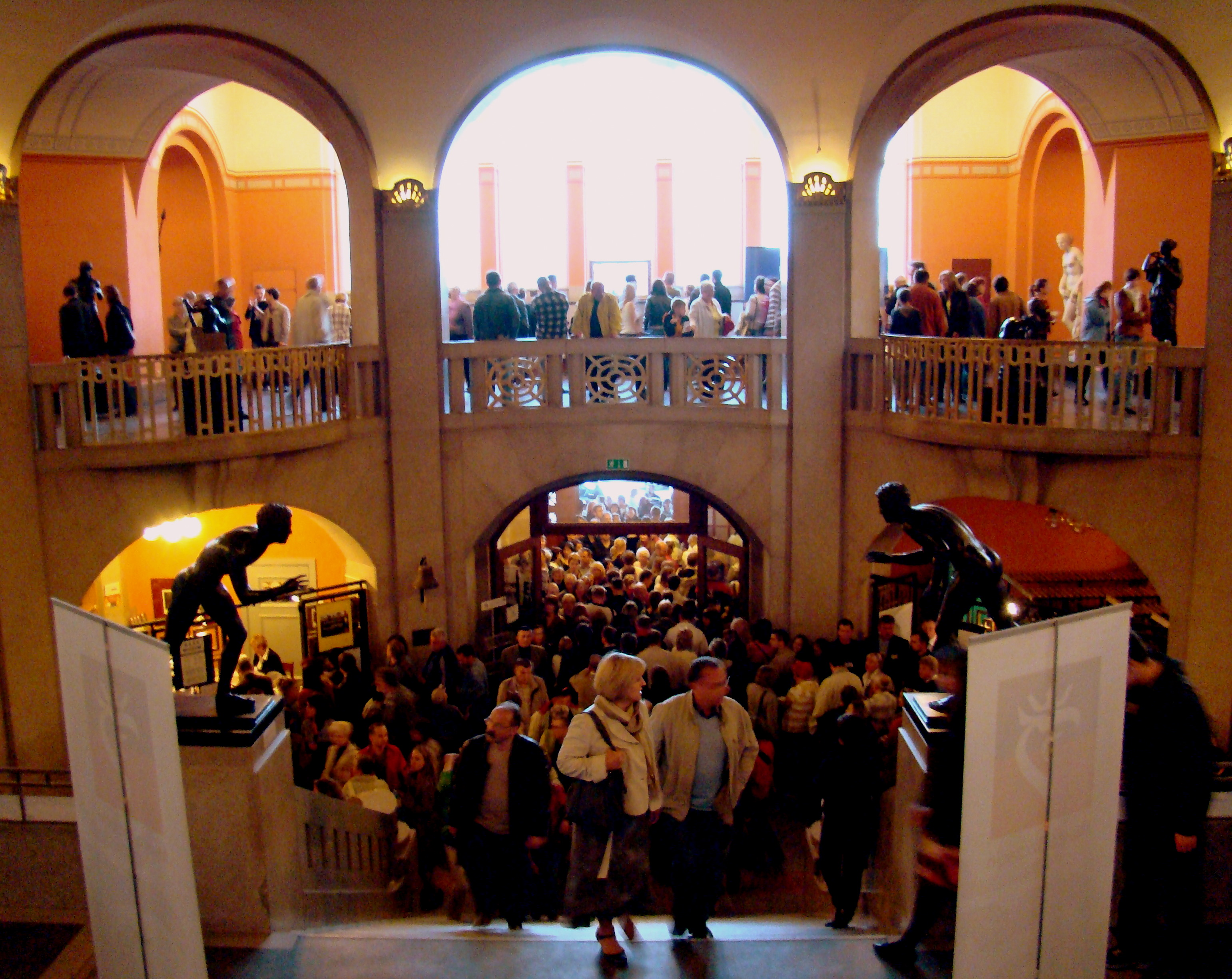 Muzeum Narodowe, Gmach Główny - IV Europejska Noc Muzeów, Szczecin, Polska